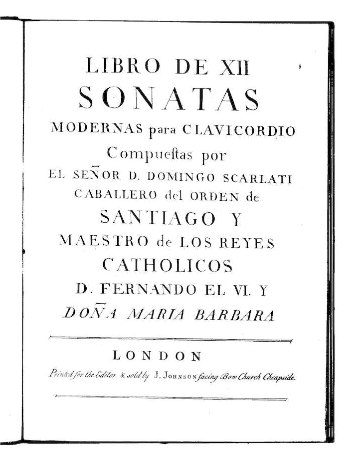 Portada de l'edició de dotze sonates de D. Scarlatti feta el 1752 per J. Johnson. S'hi observa el vincle amb els reis espanyols Ferran VI i Maria Bàrbara de Bragança.